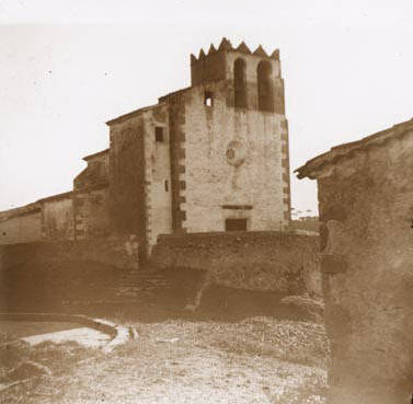 Vista de la rectoria i església del Far. Santiago Perdigó i Díaz Caneja (1917-11)